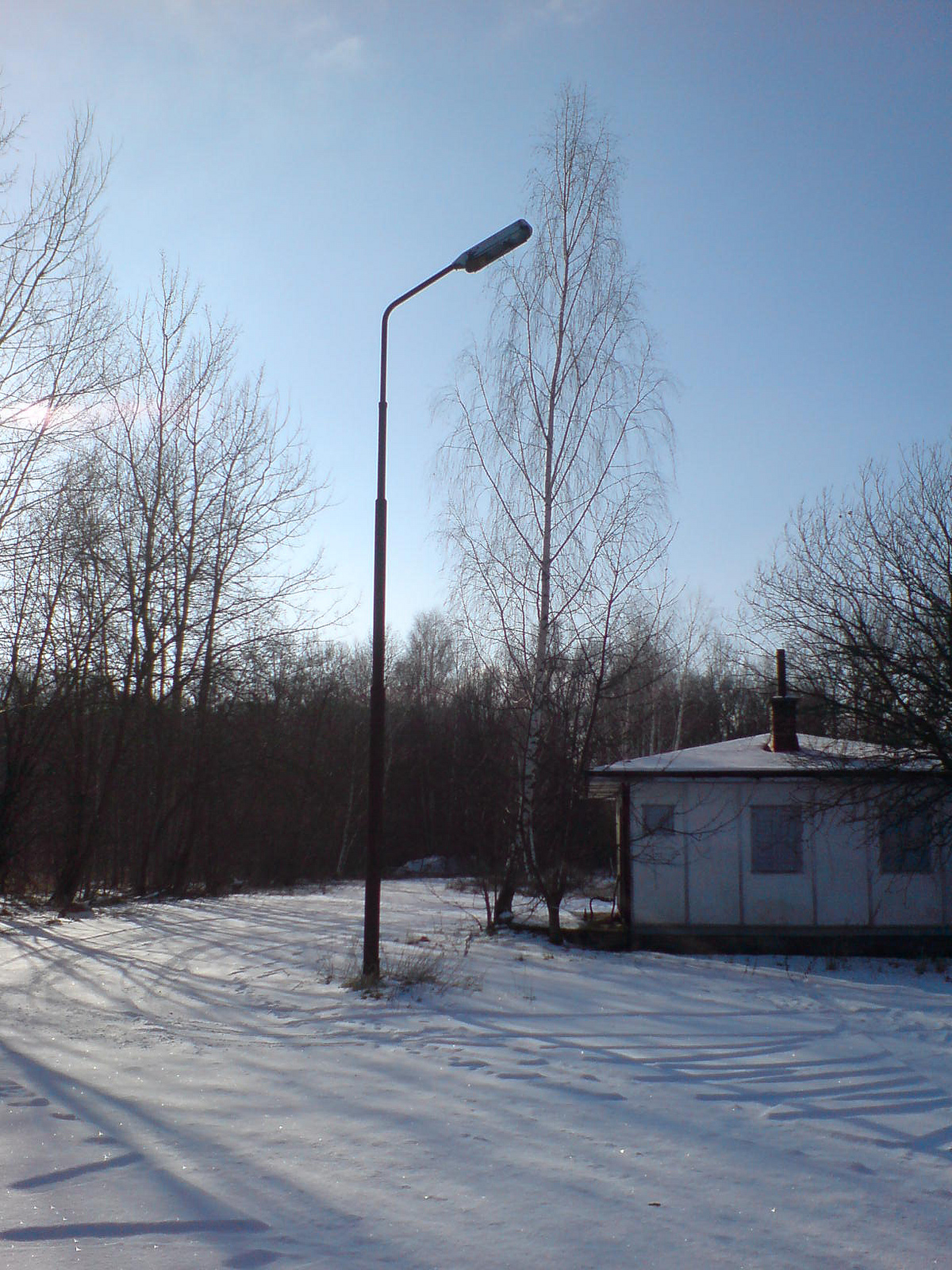 Zastávka Frýdlant na Heřmaničce.